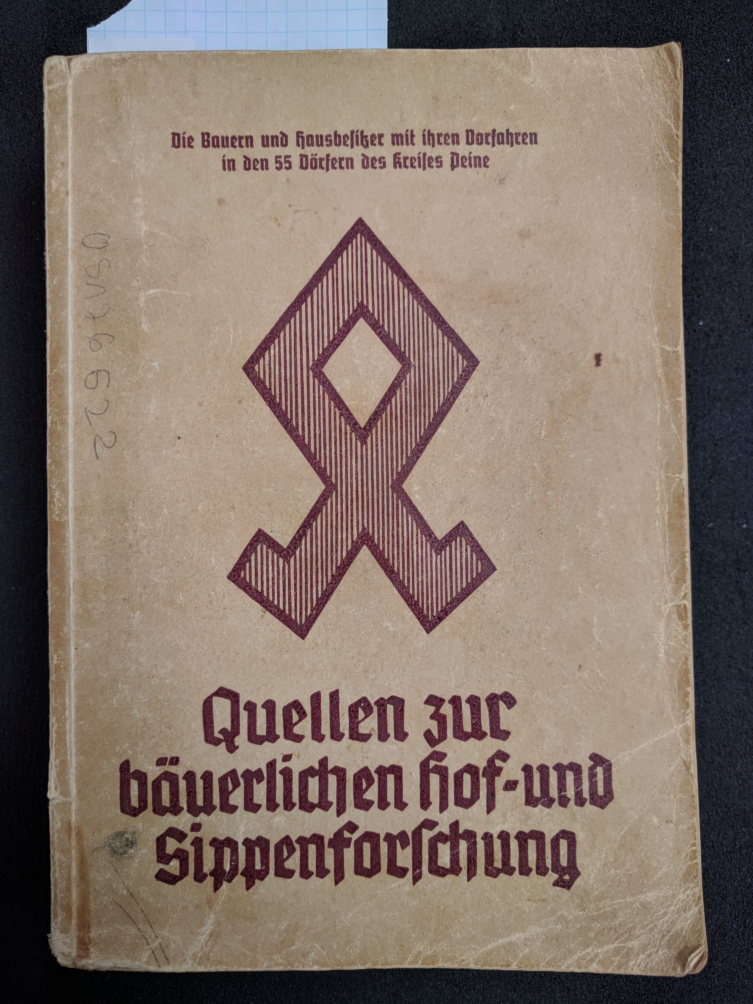 Abbildung der Odal-Rune auf einem Buch des Verwaltungsamtes des Reichbauernführers in Goslar aus dem Jahr 1938.